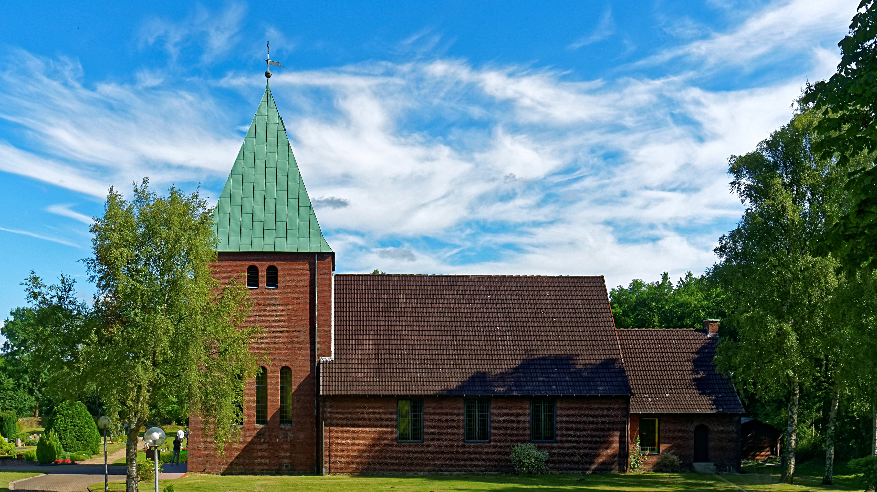 Gedächtniskirche Idstedt, Kreis Schleswig-Flensburg, Idstedt, Ortsteil Idstedtkirche